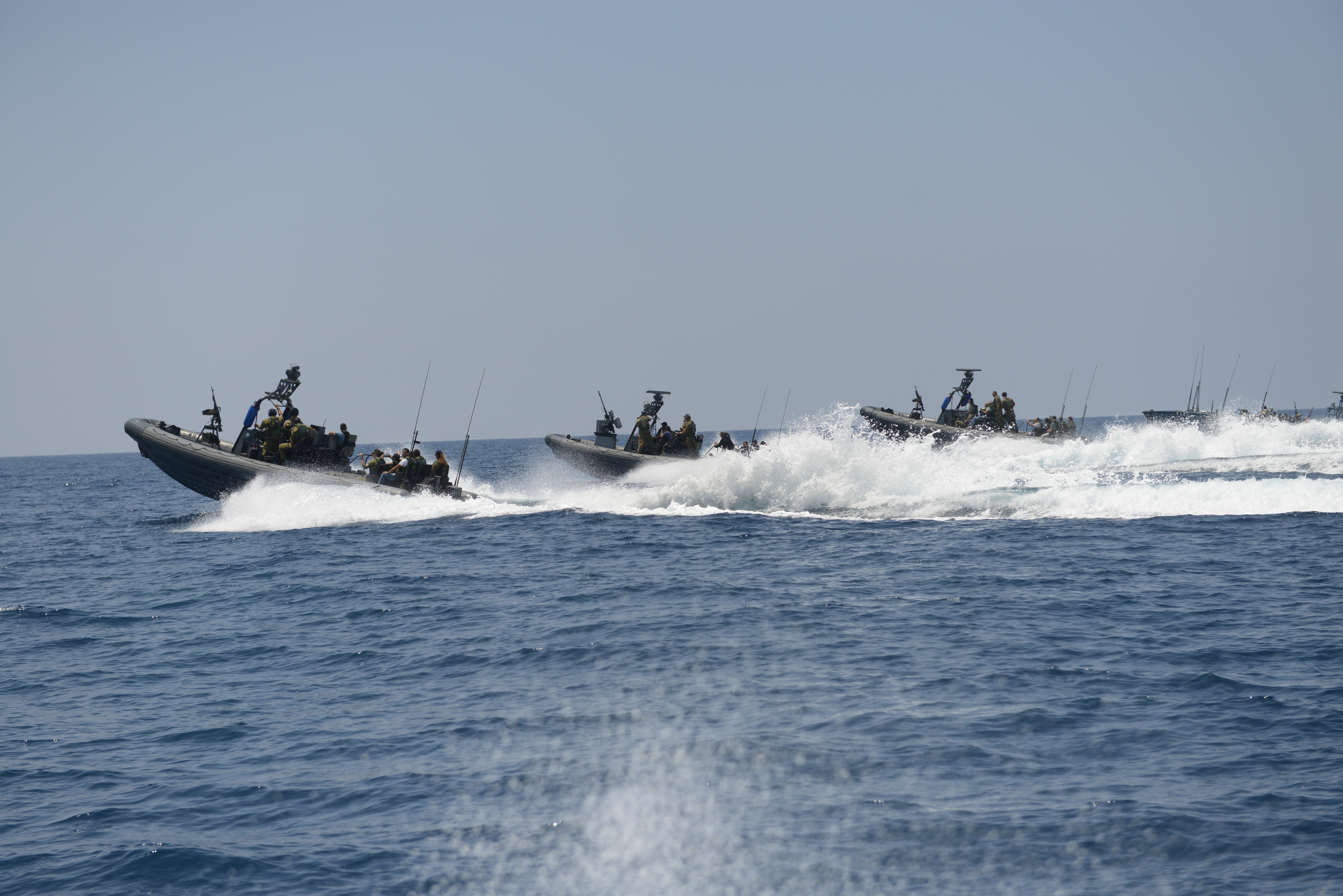 הקומנדו הימי